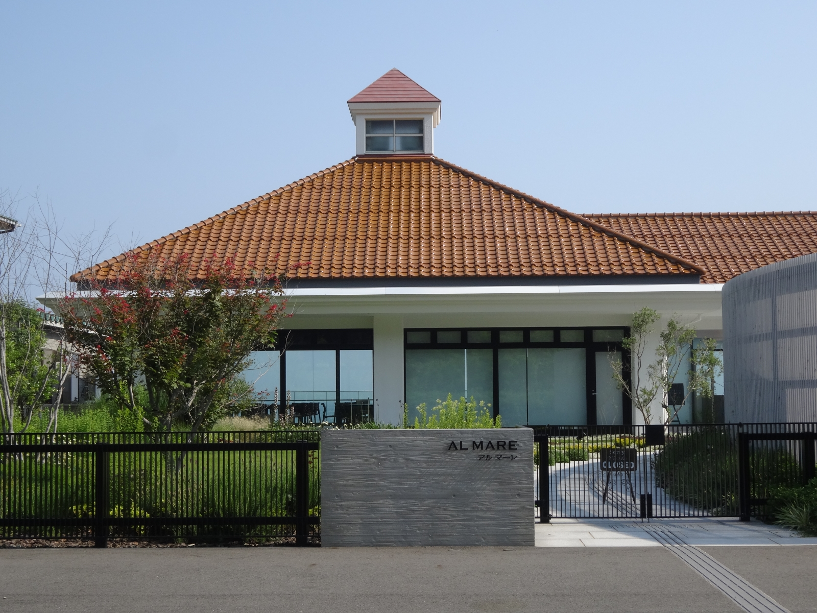 イタリアンレストラン「AL MARE（アルマーレ）」